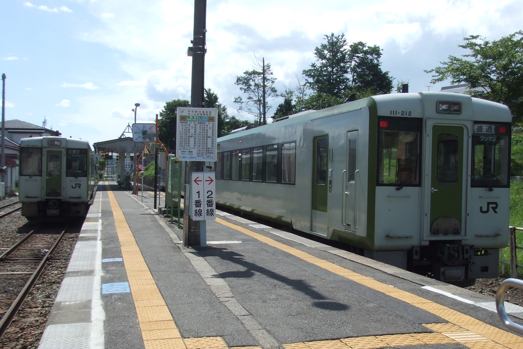 戸狩野沢温泉駅 ホームの様子